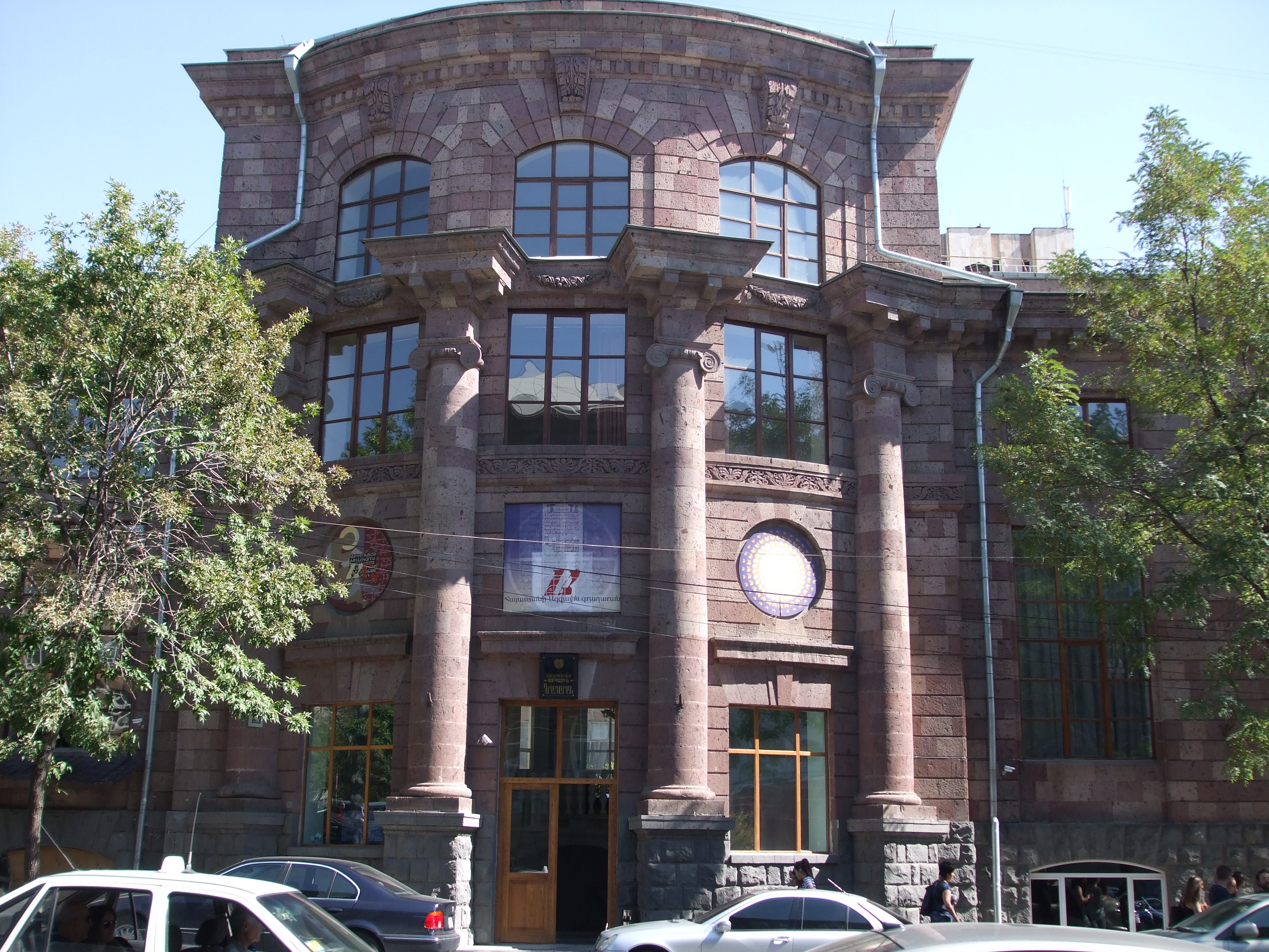 Գրադարանի շենք. Ազգային գրադարանի գլխավոր մասնաշենքը, 1928-1940 թթ., Տերյան փող. 72, ճարտ.` Ալ. Թամանյան 6/66